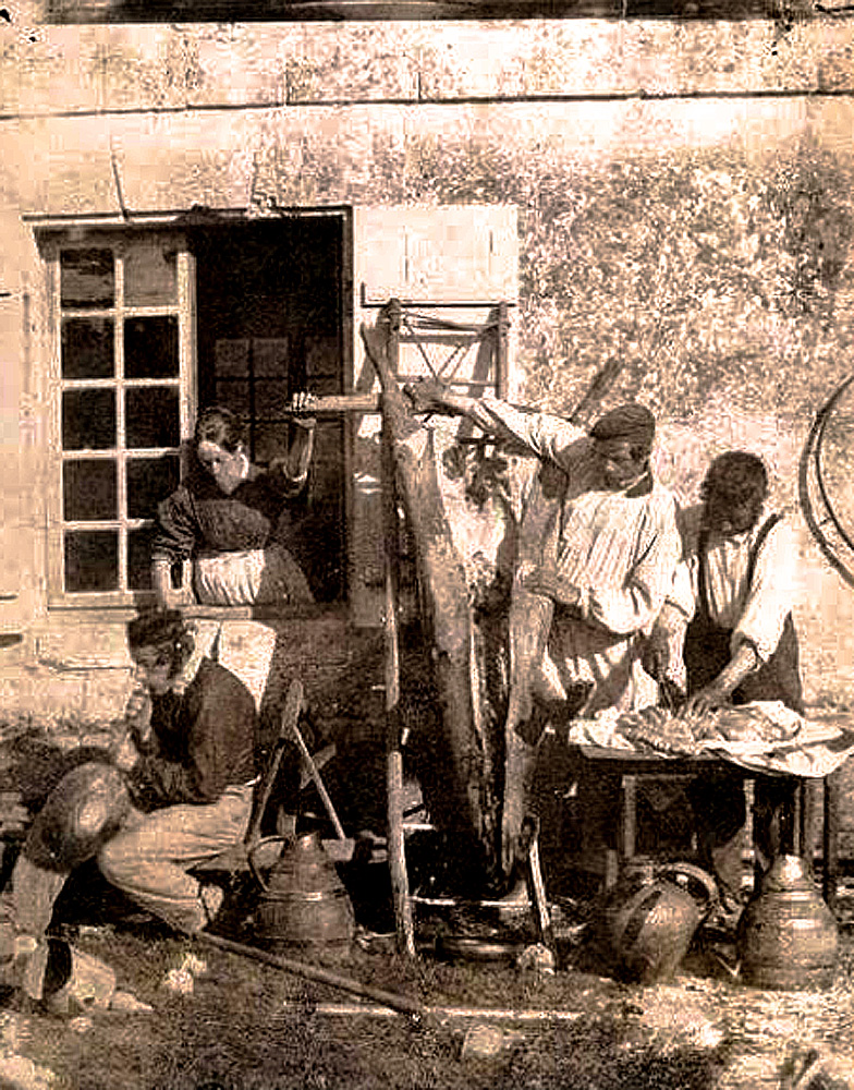 Scène paysanne : le dépeçage du porc (vers 1847), 22,8 × 18,1 cm, épreuve sur papier salé à partir d'un négatif papier. Paris, musée d'Orsay.